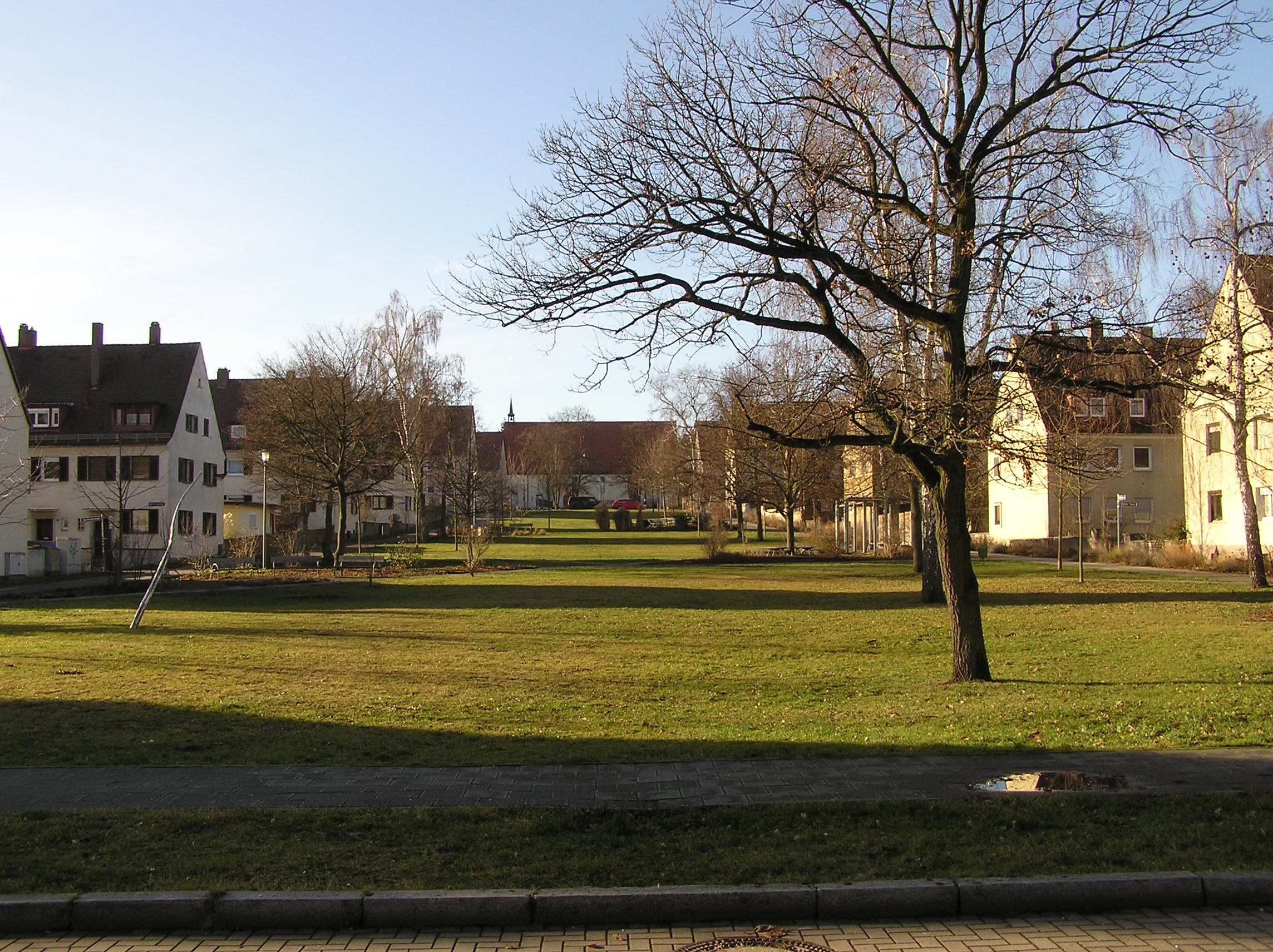 Die Parkanlage “Südtiroler Platz” in Richtung Lutherkirche, im Stadtteil Hasenbuck, in Nürnberg.